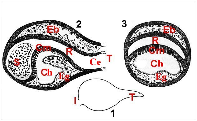 Schémas de coupes longitudinale et transversale du bulbe copulateur de Nemesia caementaria